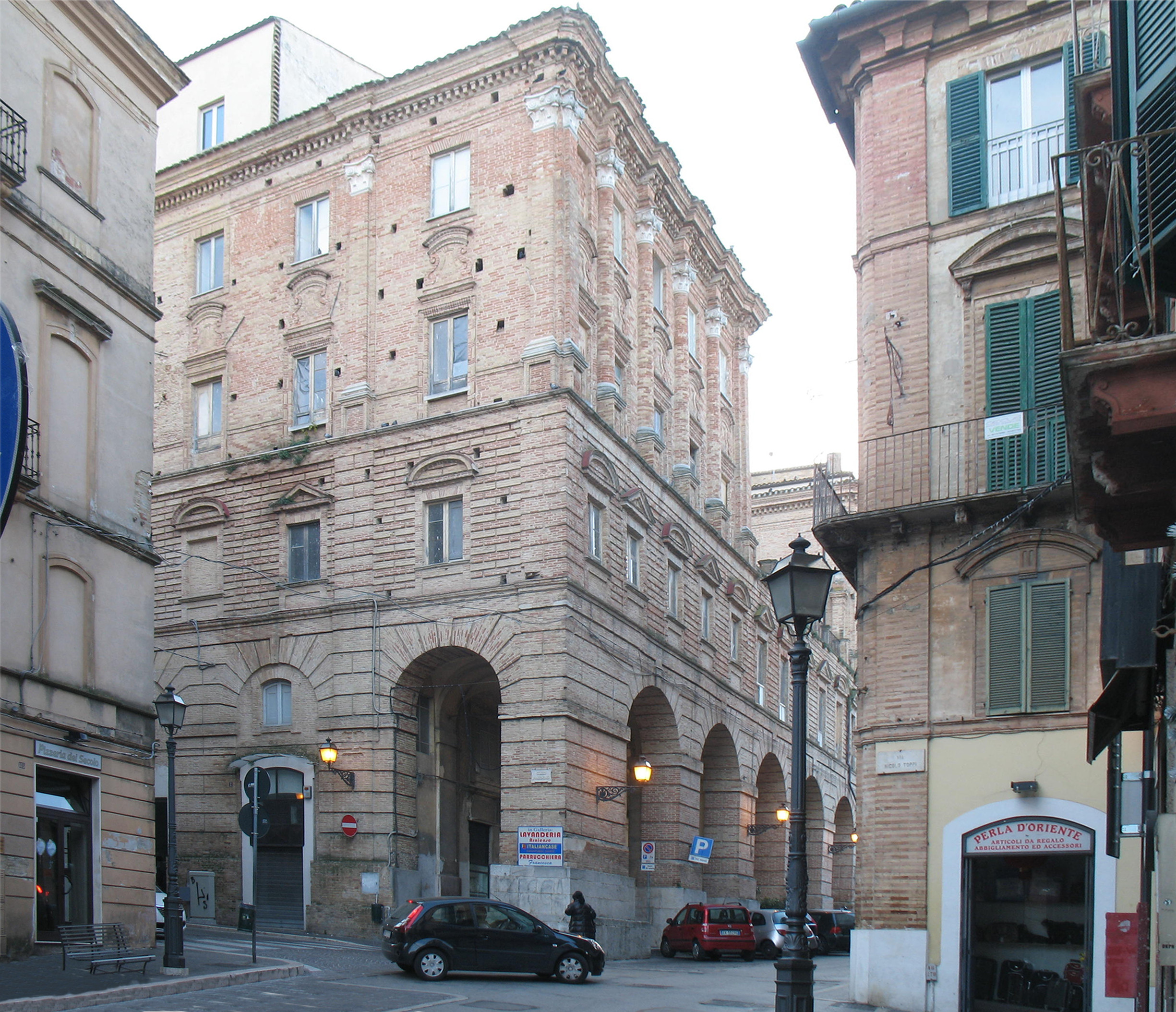 Il Seminario Diocesano di Chieti fu fondato nel 1500 da Monsignor Oliva durante il Concilio di Trento.